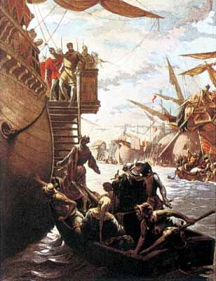 Batalla del Golf de Nàpols. Roger de Llúria captura al Príncep de Salerno, Carles d'Anjou.